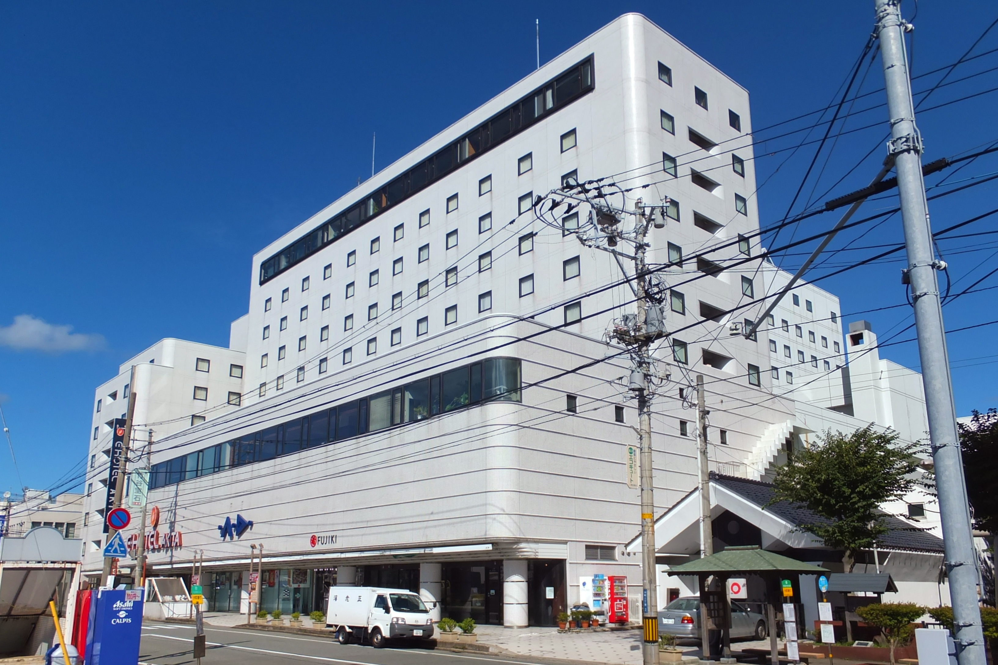 eホテル秋田とファッションアベニューAD（秋田市大町）。旧秋田ワシントンホテルをグローカル・ホテルグループが譲受して経営を引き継いだもの。